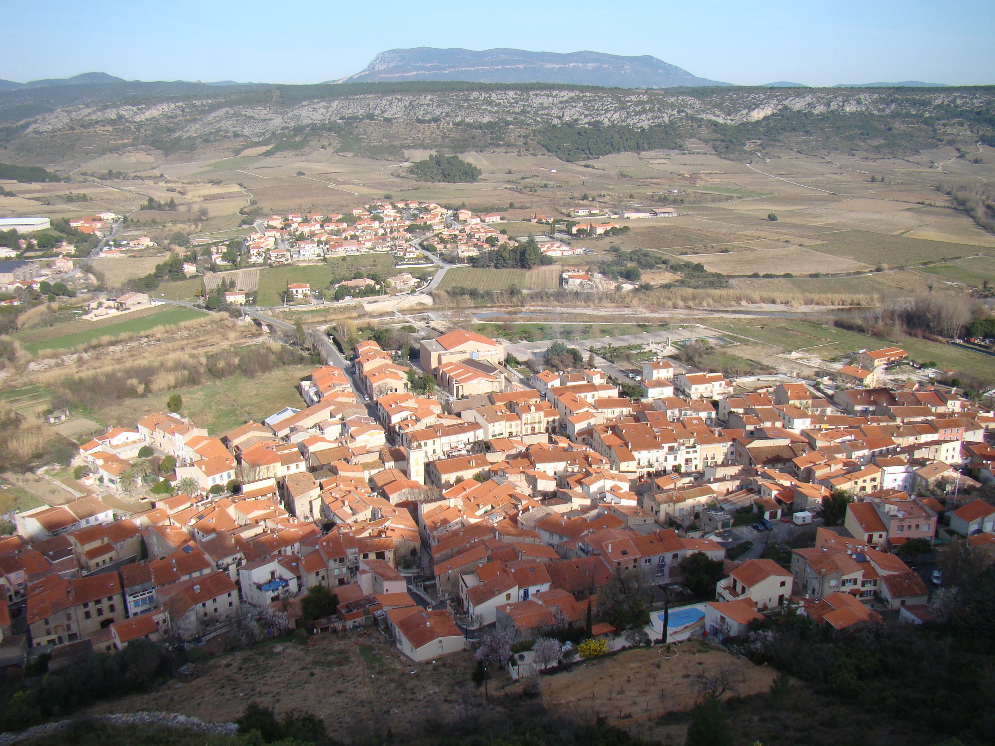 Tautavel vue depuis le château. Au fond, le mont Tauch.